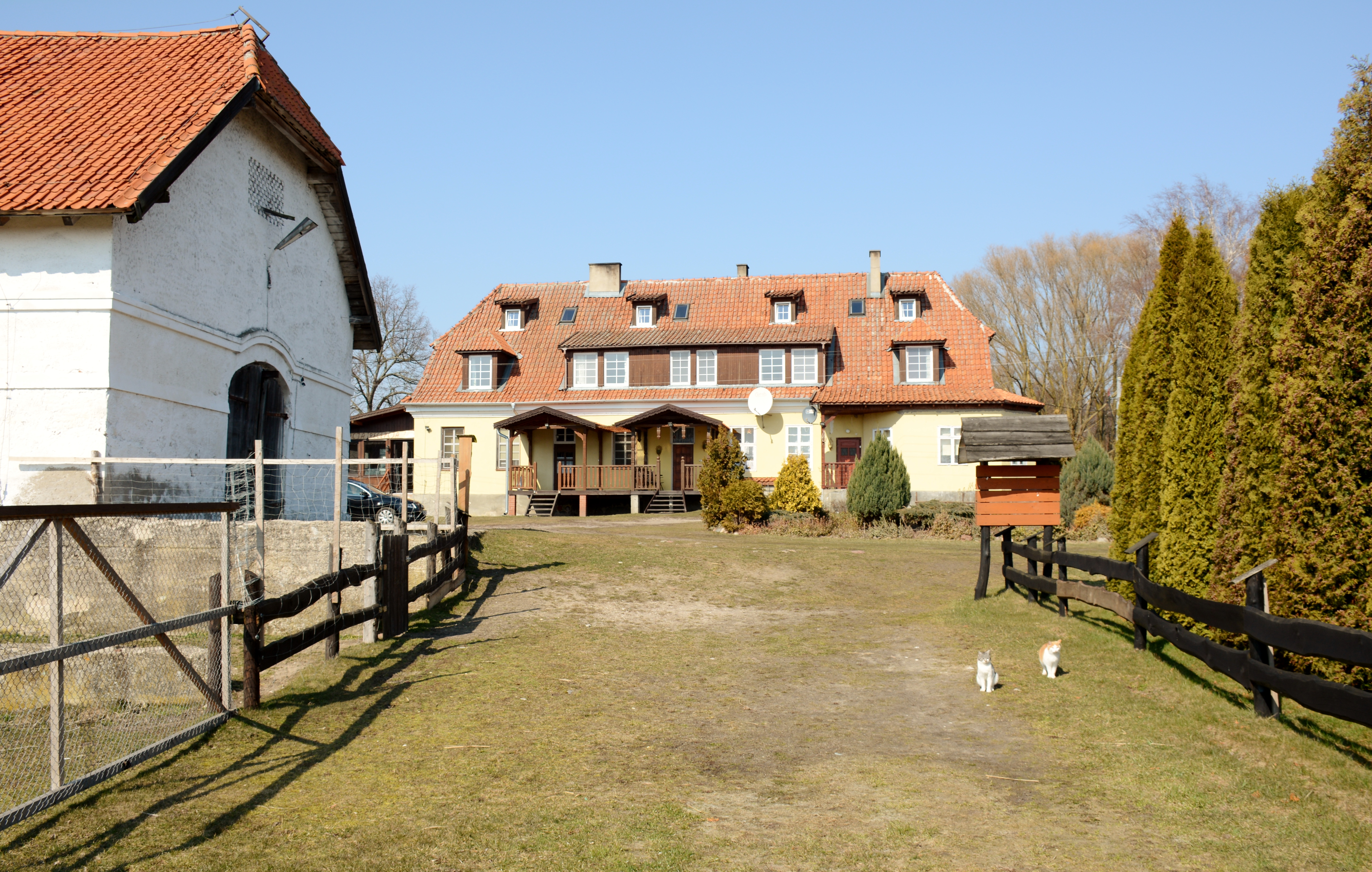 Luknajno,Gmina-Mikolajki,Polska,UE.